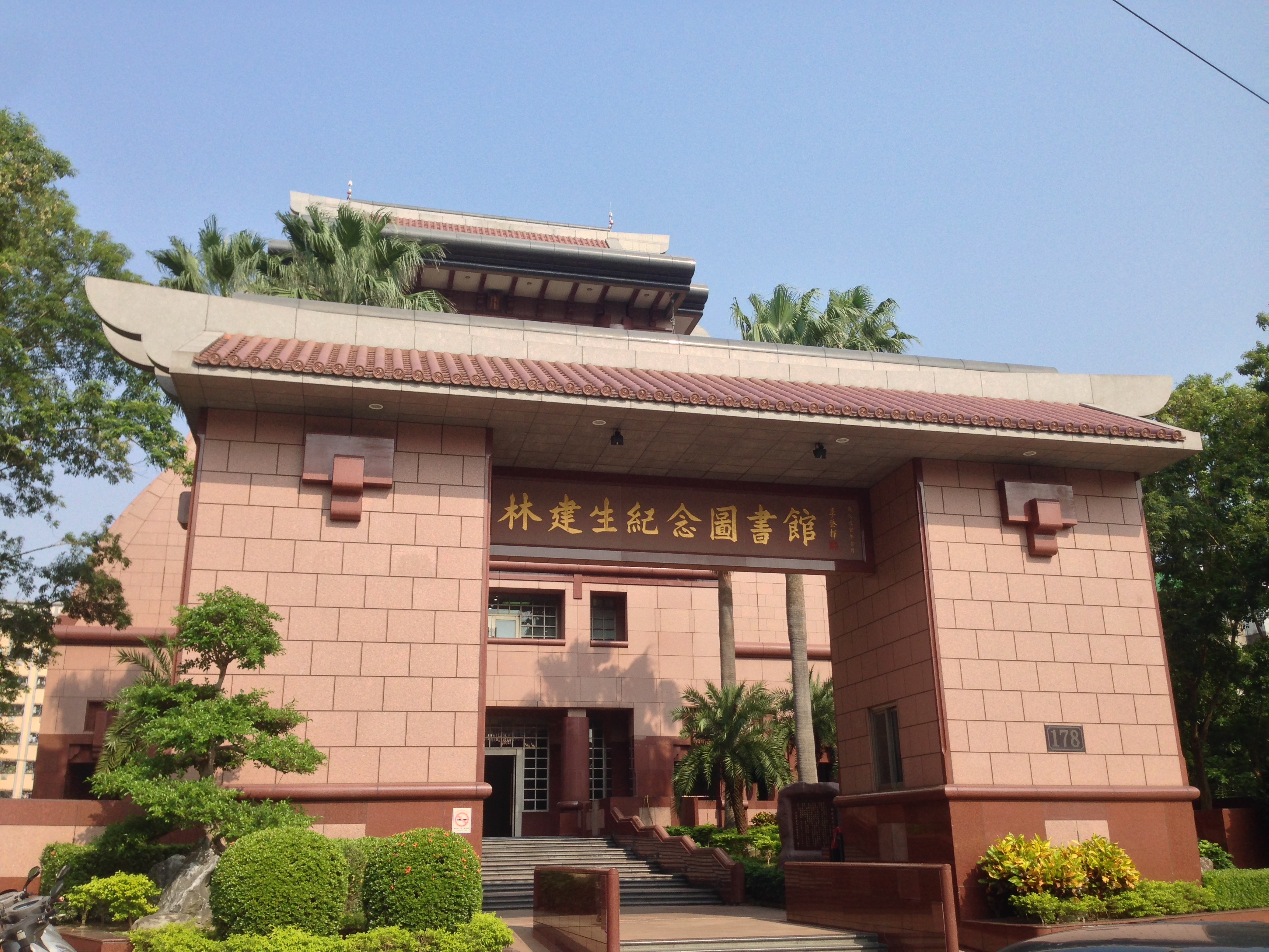 中文（台灣）: 林建生紀念圖書館，位於新北市蘆洲區三民路178號。